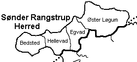 Sønder-Ragnstrup Herred, Aabenraa Amt, Danmark.